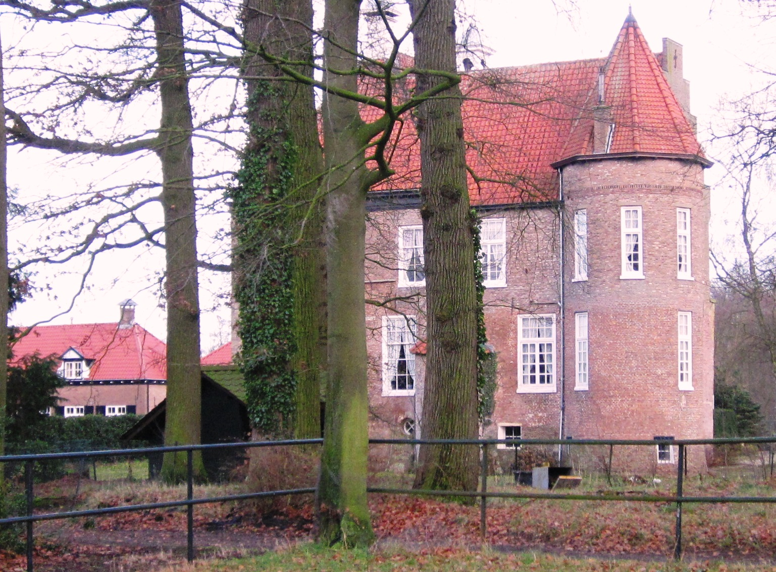 Huis Boxbergen te Wesepe gemeente Olst-Wijhe. Zuidzijde